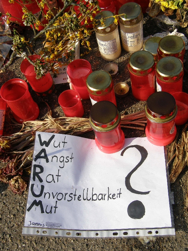 Bilder der Albertville-Realschule aus Winnenden